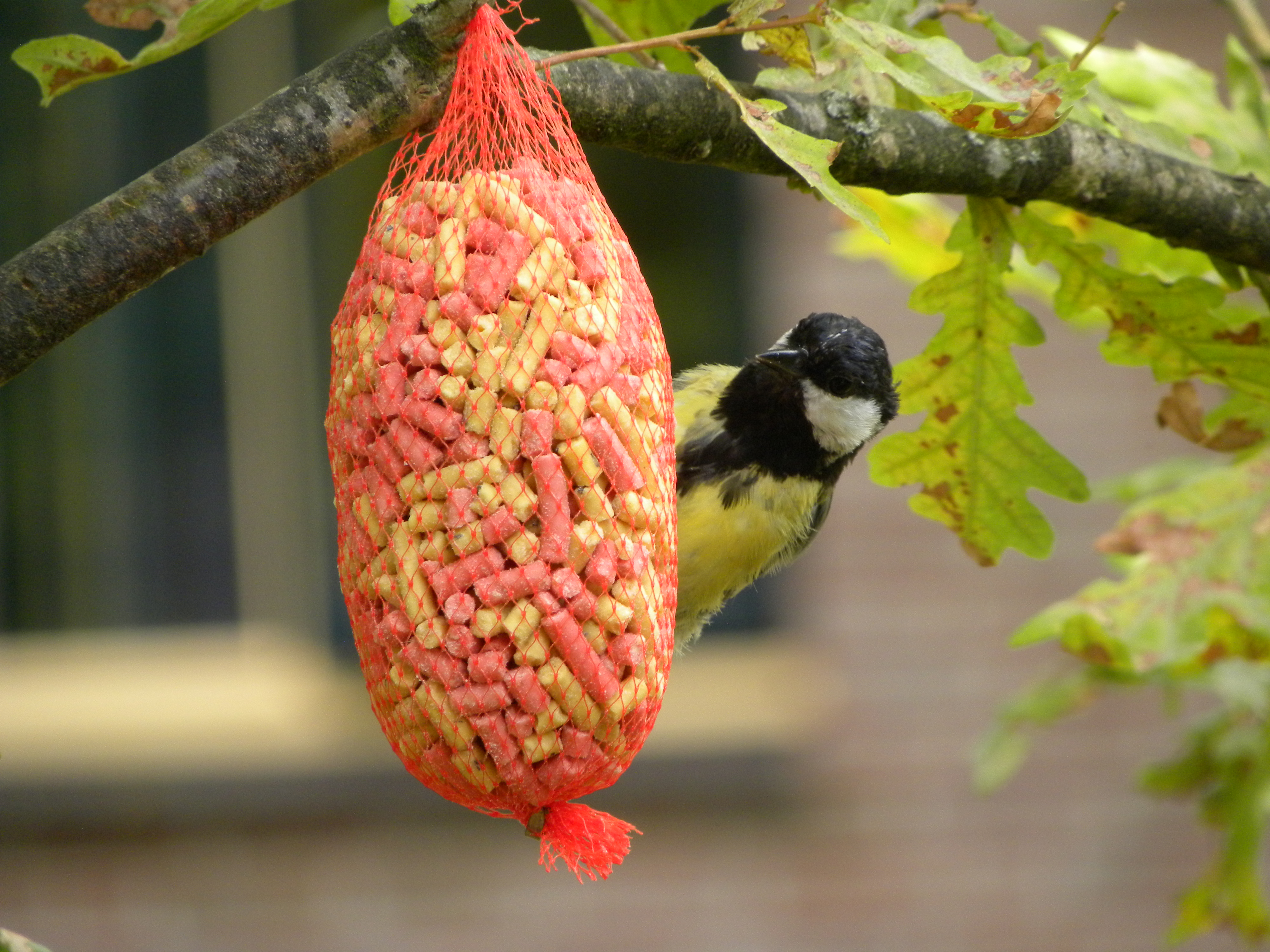 Deze foto is gemaakt op Landal Aelderholt in Aalden (Nederland). This picture was taken at Landal Aelderholt at Aalden (Netherlands).